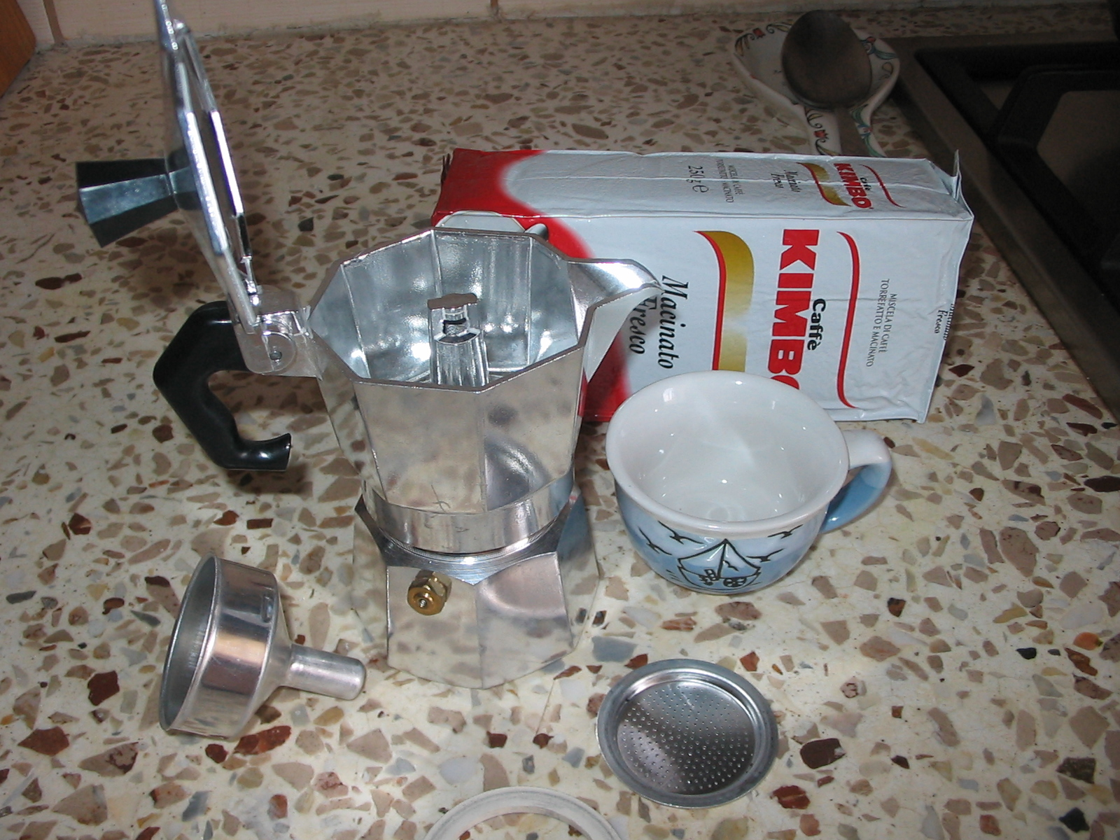 Кавоварка «Експрессо»